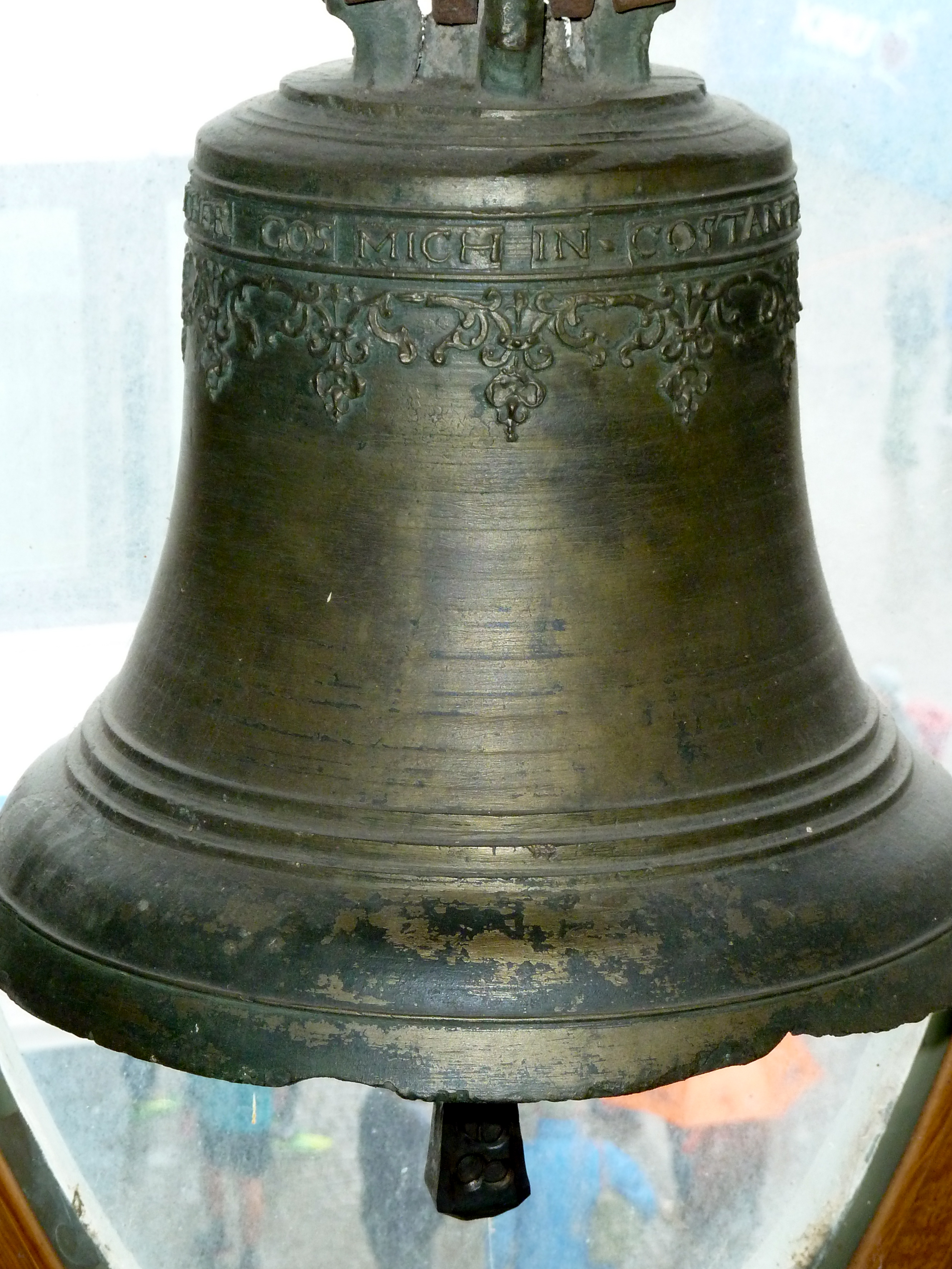 Marktglocke mit der Aufschrift: Leonhart Rosenlecher gos mich in Constantz anno 1655.